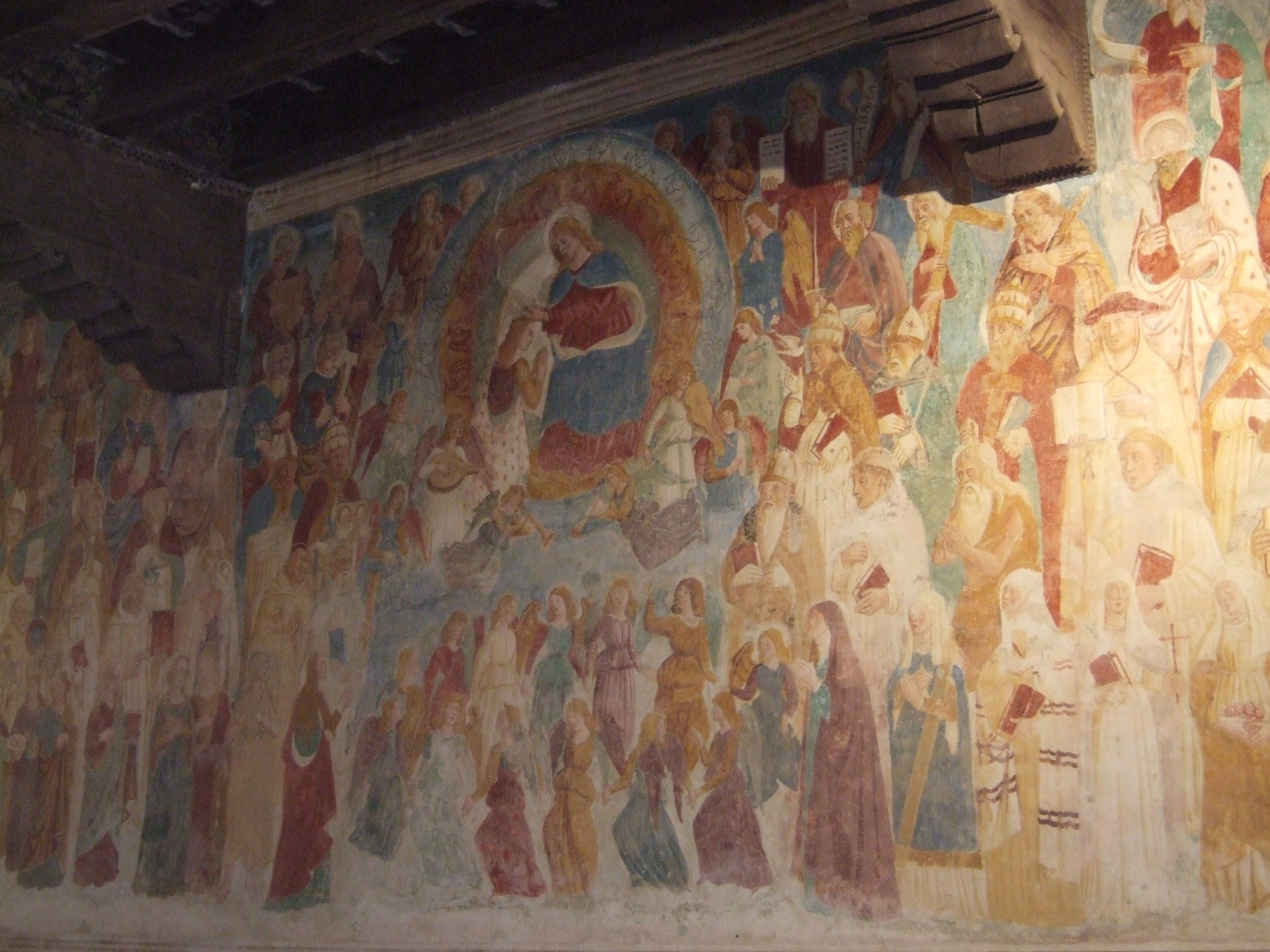 Abbazia di Sesto al Reghena